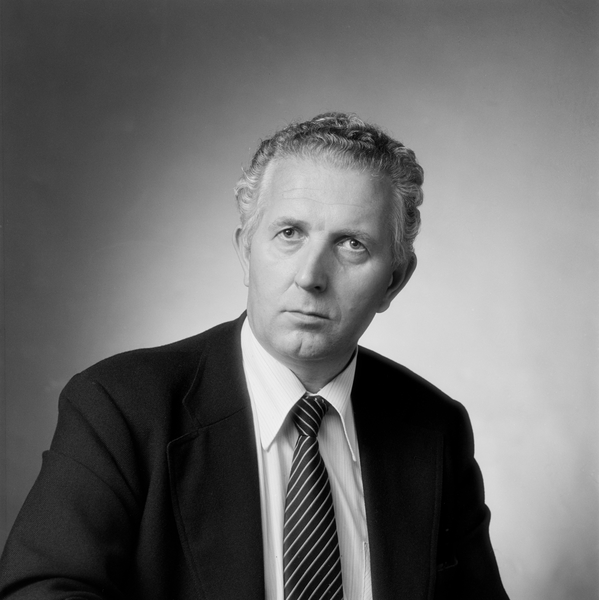 portrett, mann, journalist, redaktør, forfatter, brystbilde.